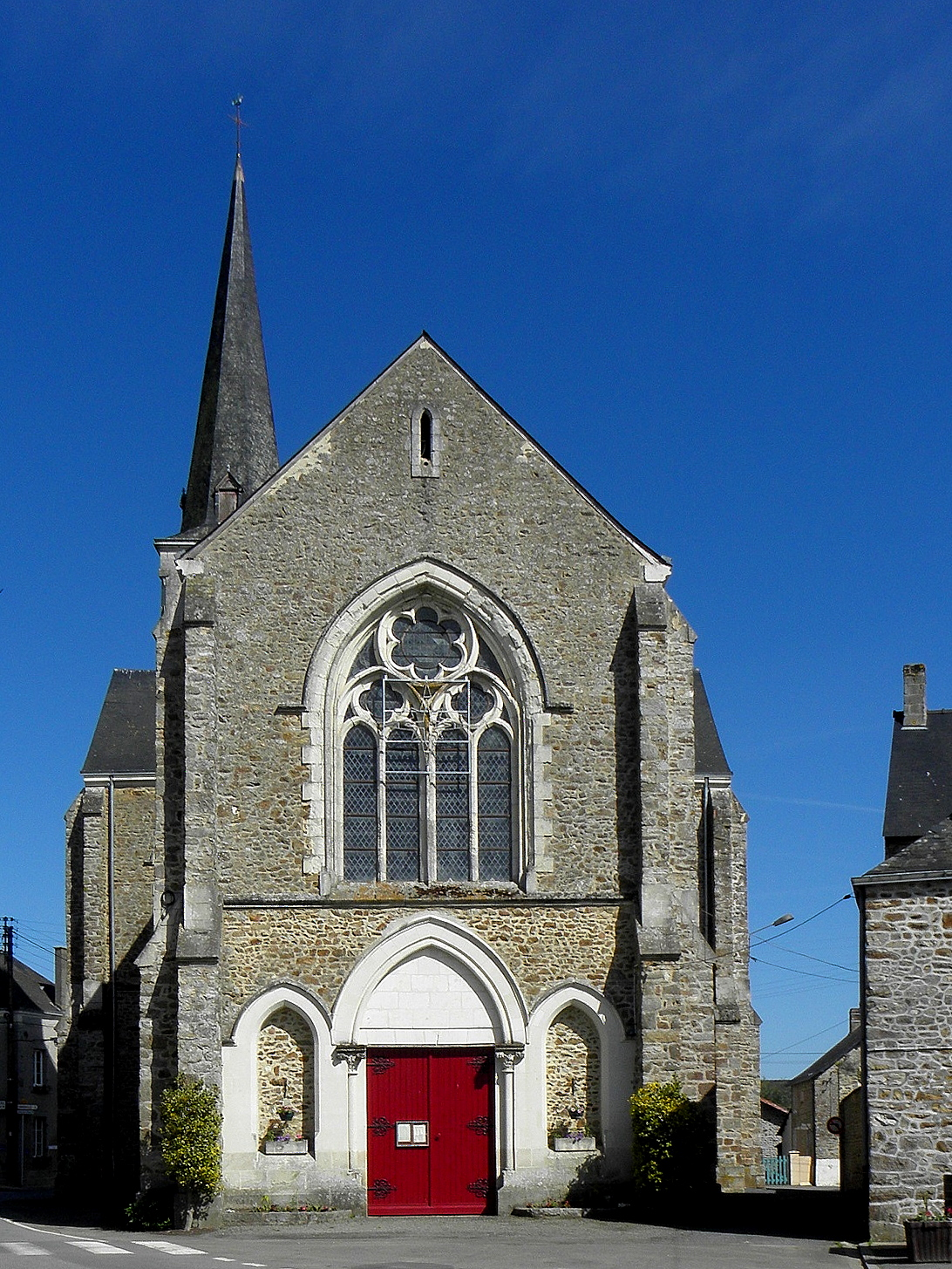 Église Saint-Germain de Saint-Germain-le-Guillaume (53). Façade principale.